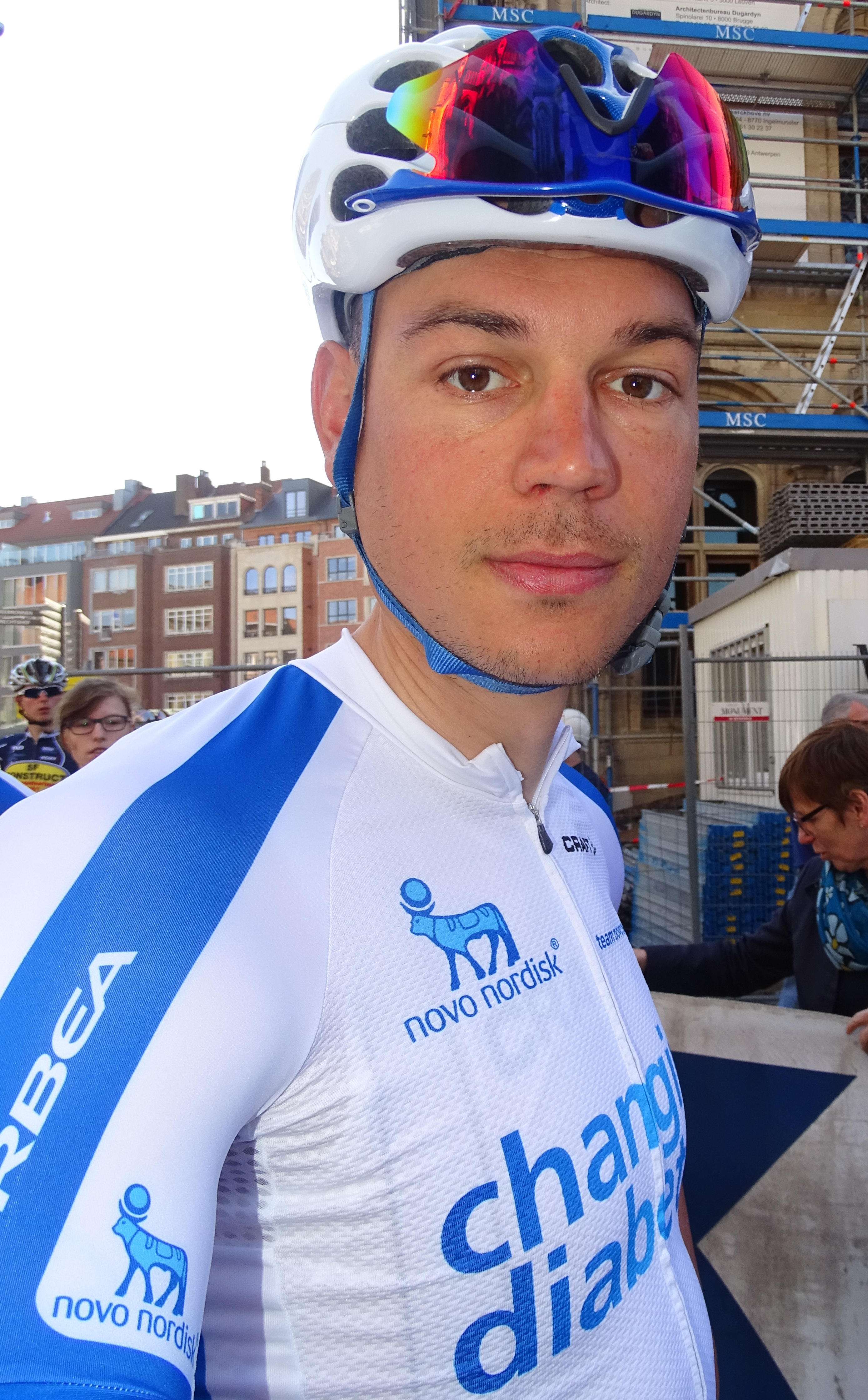 Reportage réalisé le mercredi 15 avril à l'occasion du départ de la Flèche brabançonne 2015 à Louvain, Belgique.